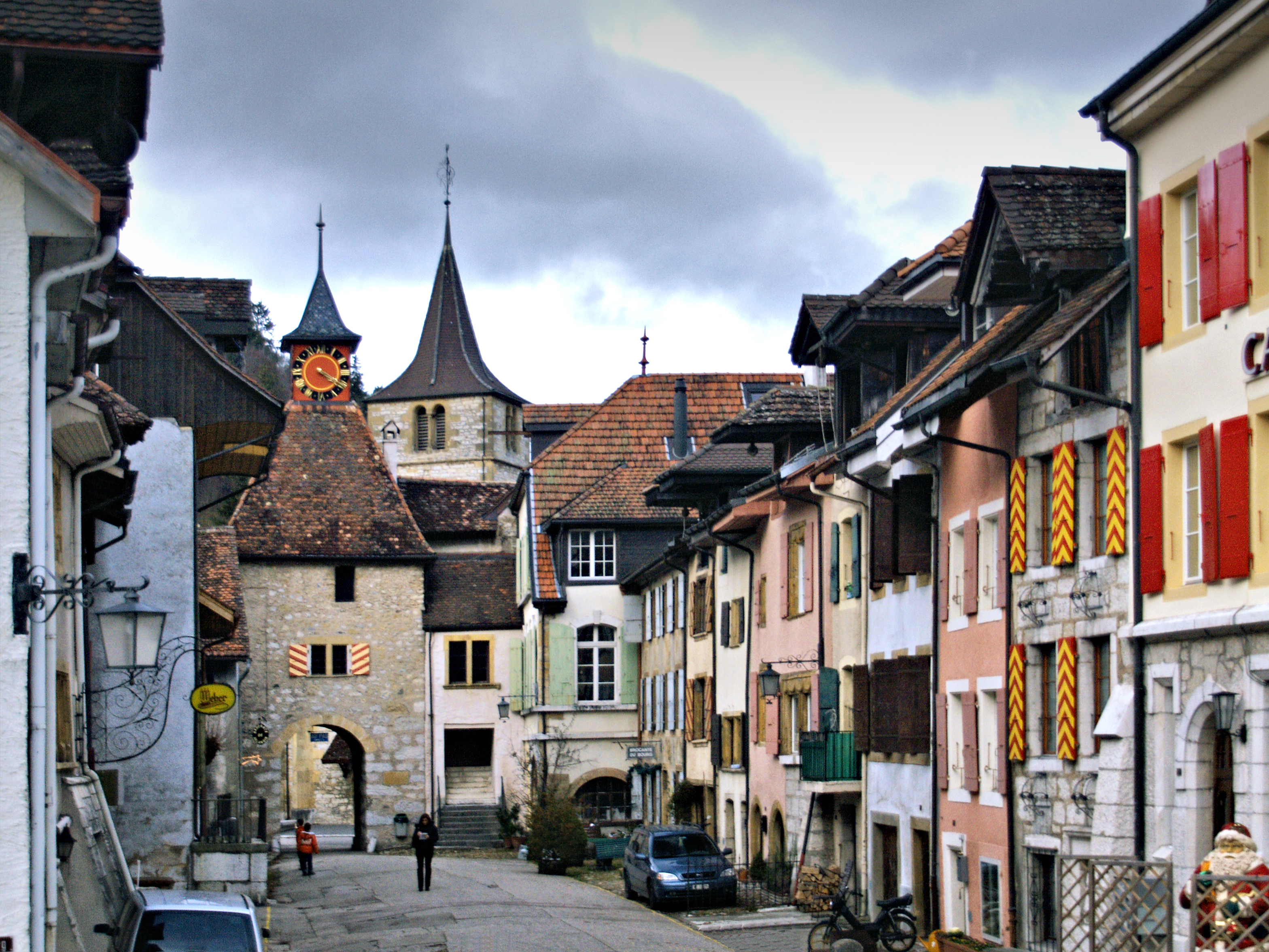 Valangin, Neuchâtel (Suisse) - Le vieux bourg